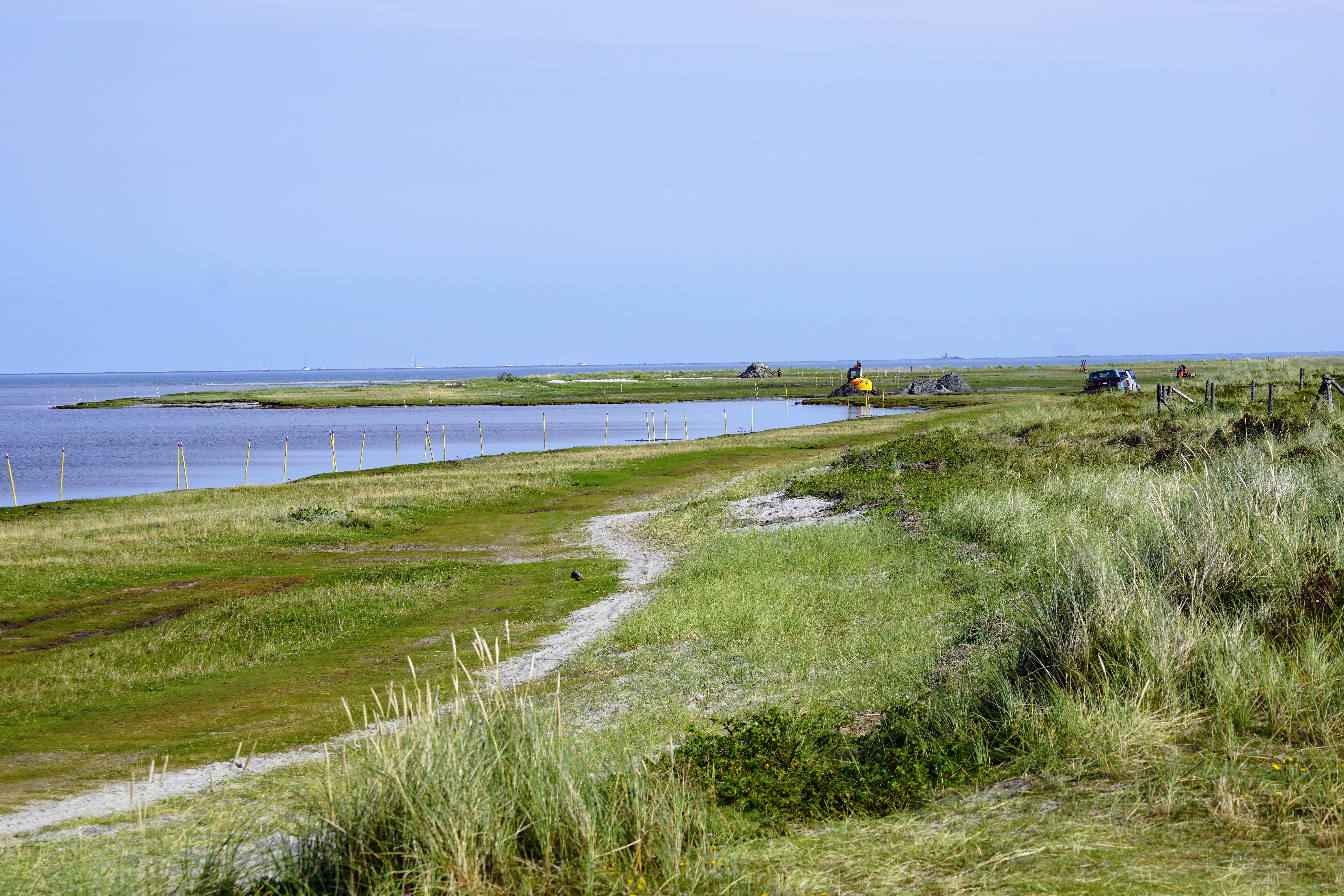 Pynt ved Kirkeflods udløb